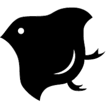 先斗町 紋章